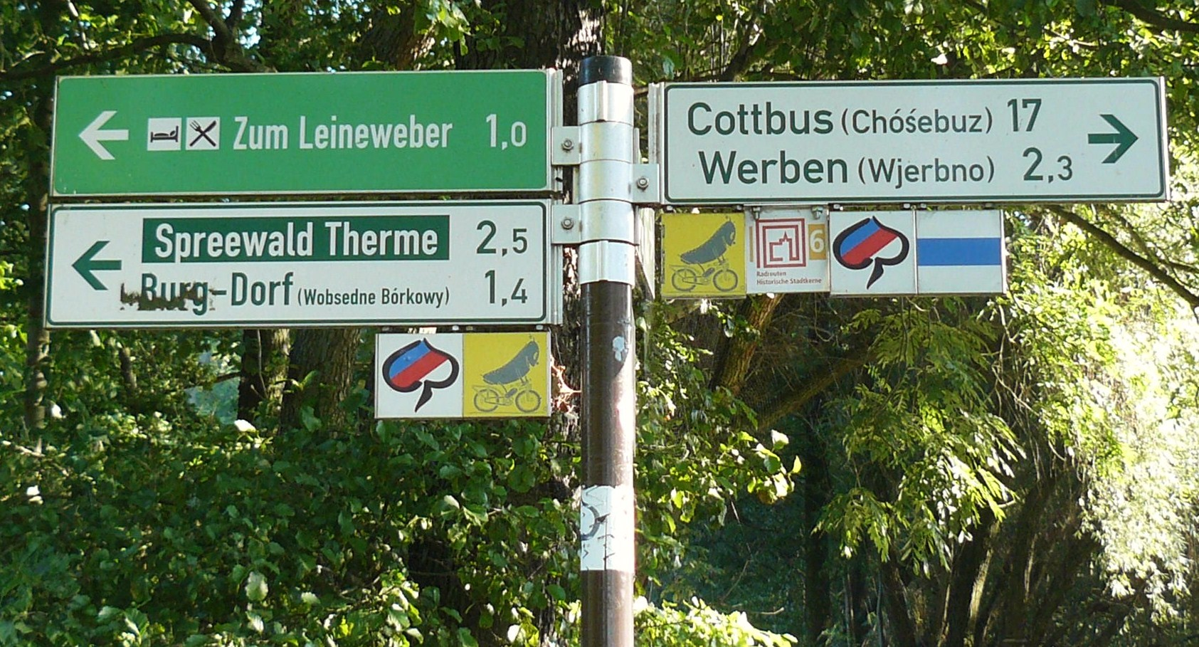 Gurkenradweg. Szlak ogórkowy, Spreewald.